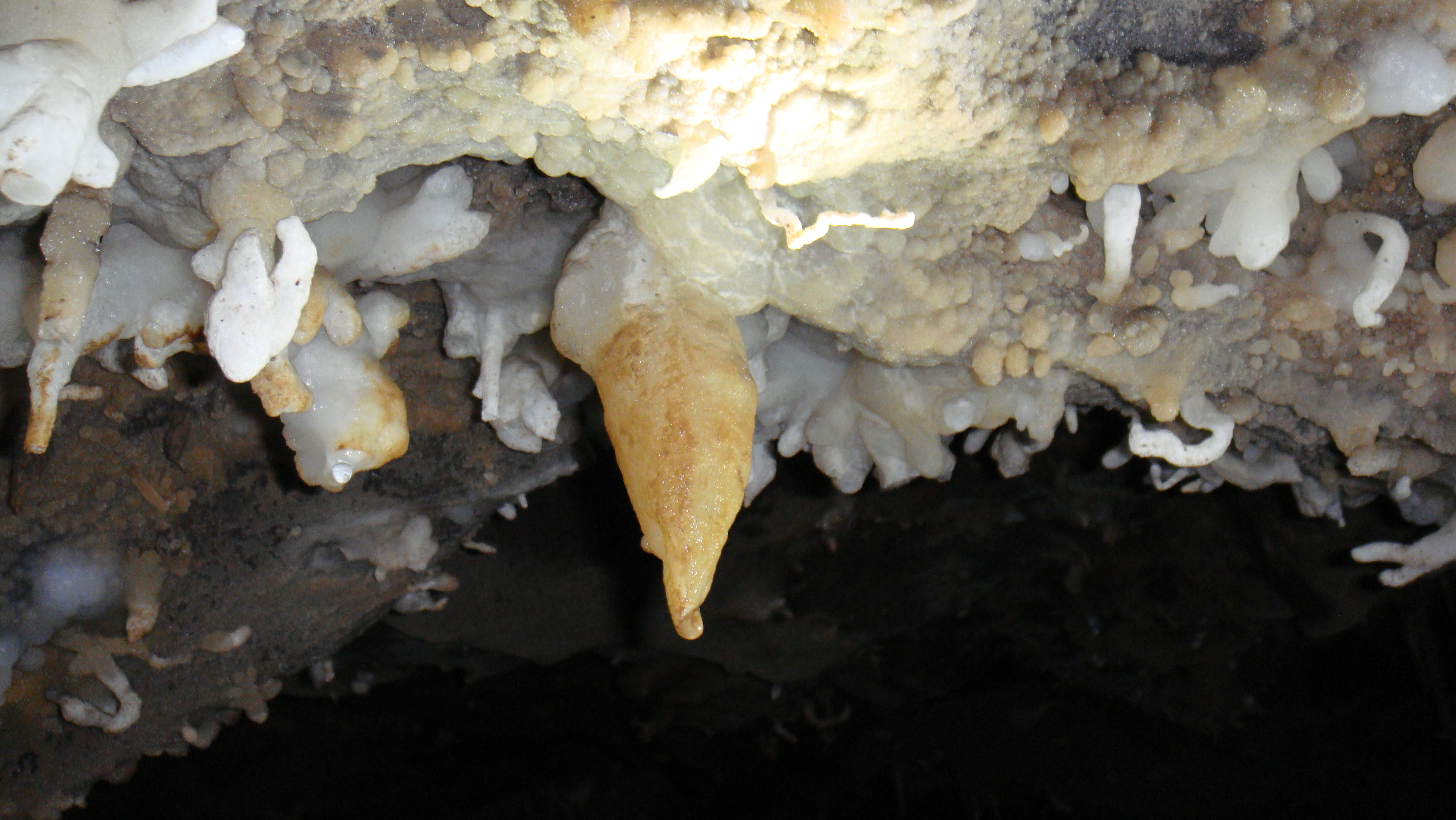 Cueva karstica de la Vallina, Asturias (España). Helictitas, macarrones y estalactitas.